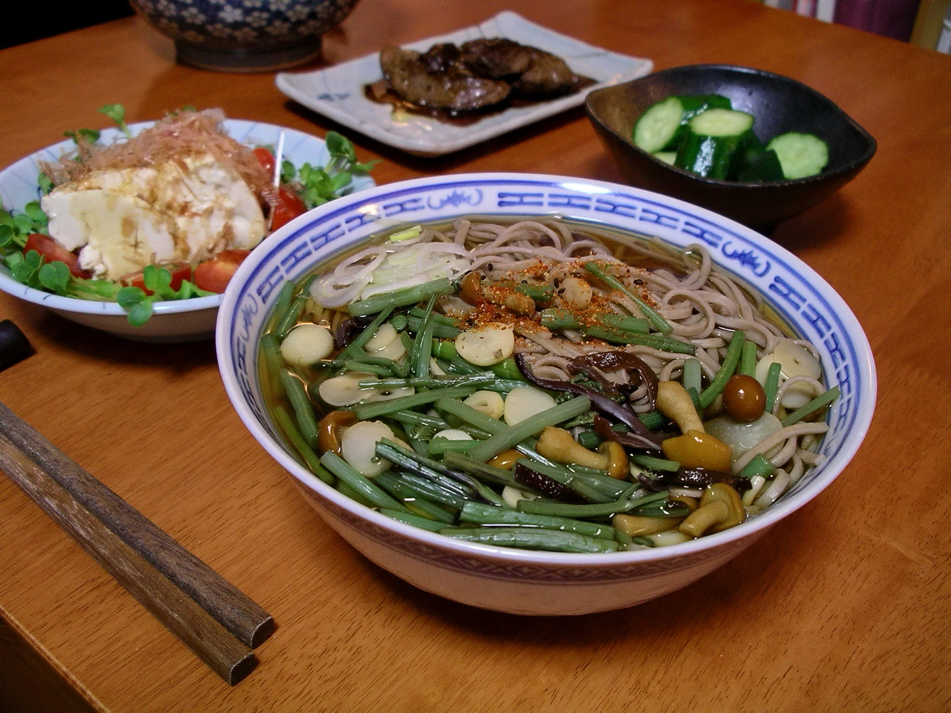 Sansai soba. Explanation here: Blue Lotus